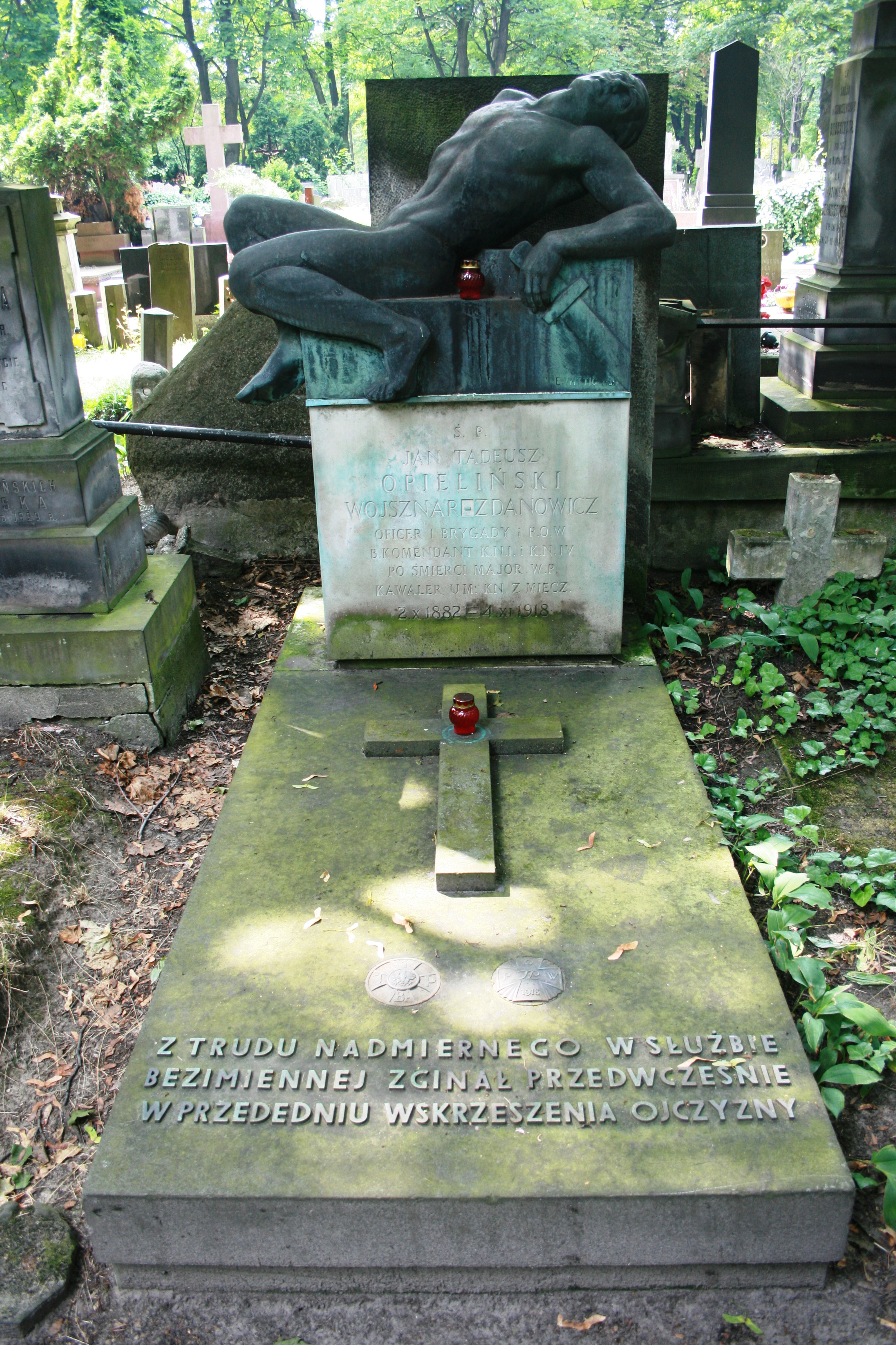 Grób Jana Opielińskiego na Cmentarzu Powązkowskim, kwatera 195